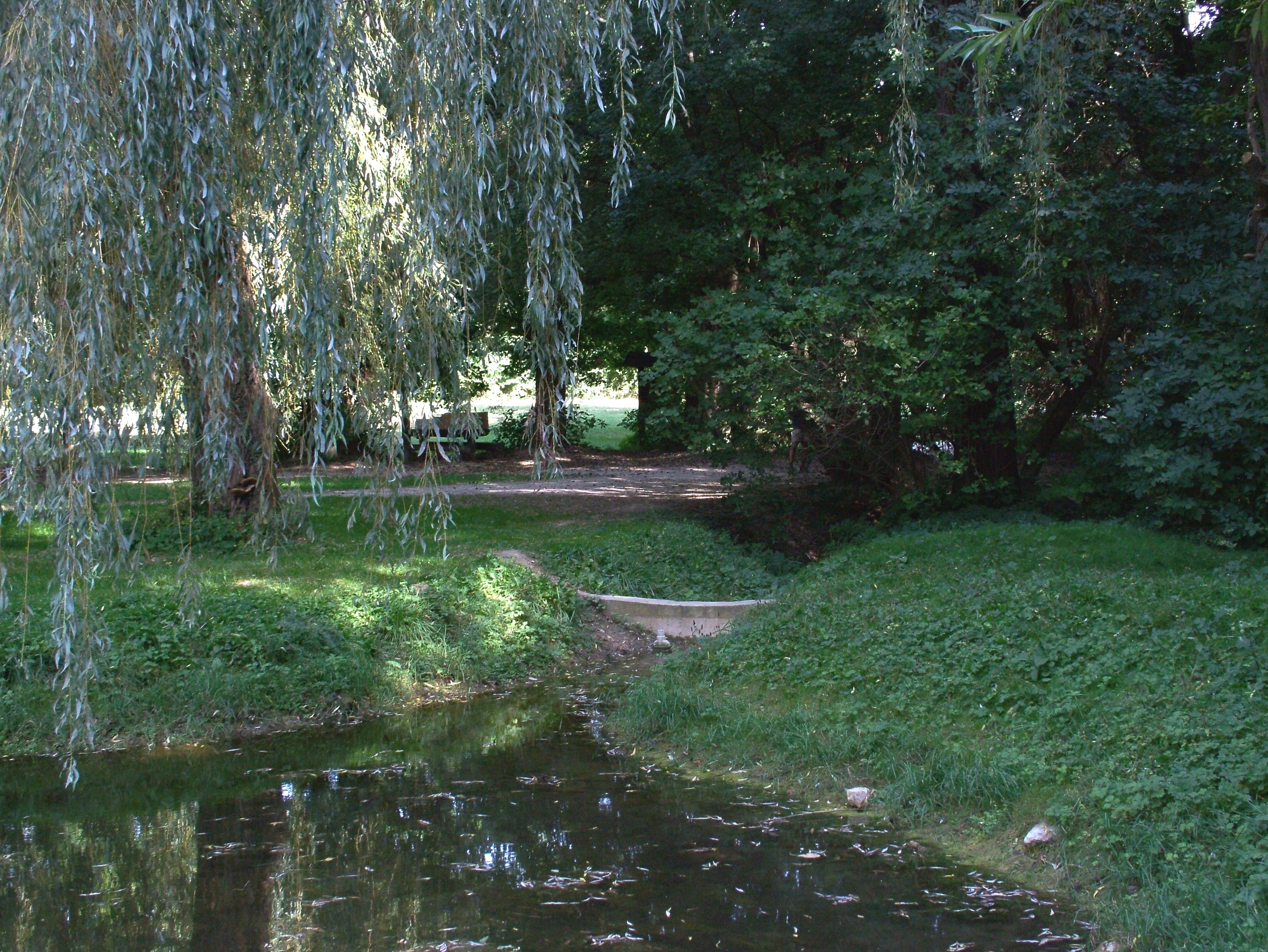 Koloska-völgy (Balatonfüred)